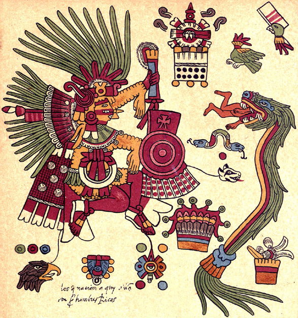 La page 12 du Codex Borbonicus représente le dieu Xipe Totec, « Notre seigneur l’écorché », qui incarne le printemps et le renouveau de la végétation. Le prêtre qui représentait Xipe Totec se livrait à un rituel particulièrement macabre: il écorchait une victime et portait sa peau comme un vêtement pendant vingt jours. Ensuite, il se débarrassait de cette vieille dépouille sanglante et puante afin d´annoncer la renaissance de la nature. En regardant ce dessin plus en détail, on peut reconnaître la peau fripée et les mains pendantes de la victime écorchée. La page 12 du Codex Borbonicus représente un prêtre portant les attributs de Xipe Totec et vêtu de la peau d'une victime sacrifiée en honneur de cette divinité.